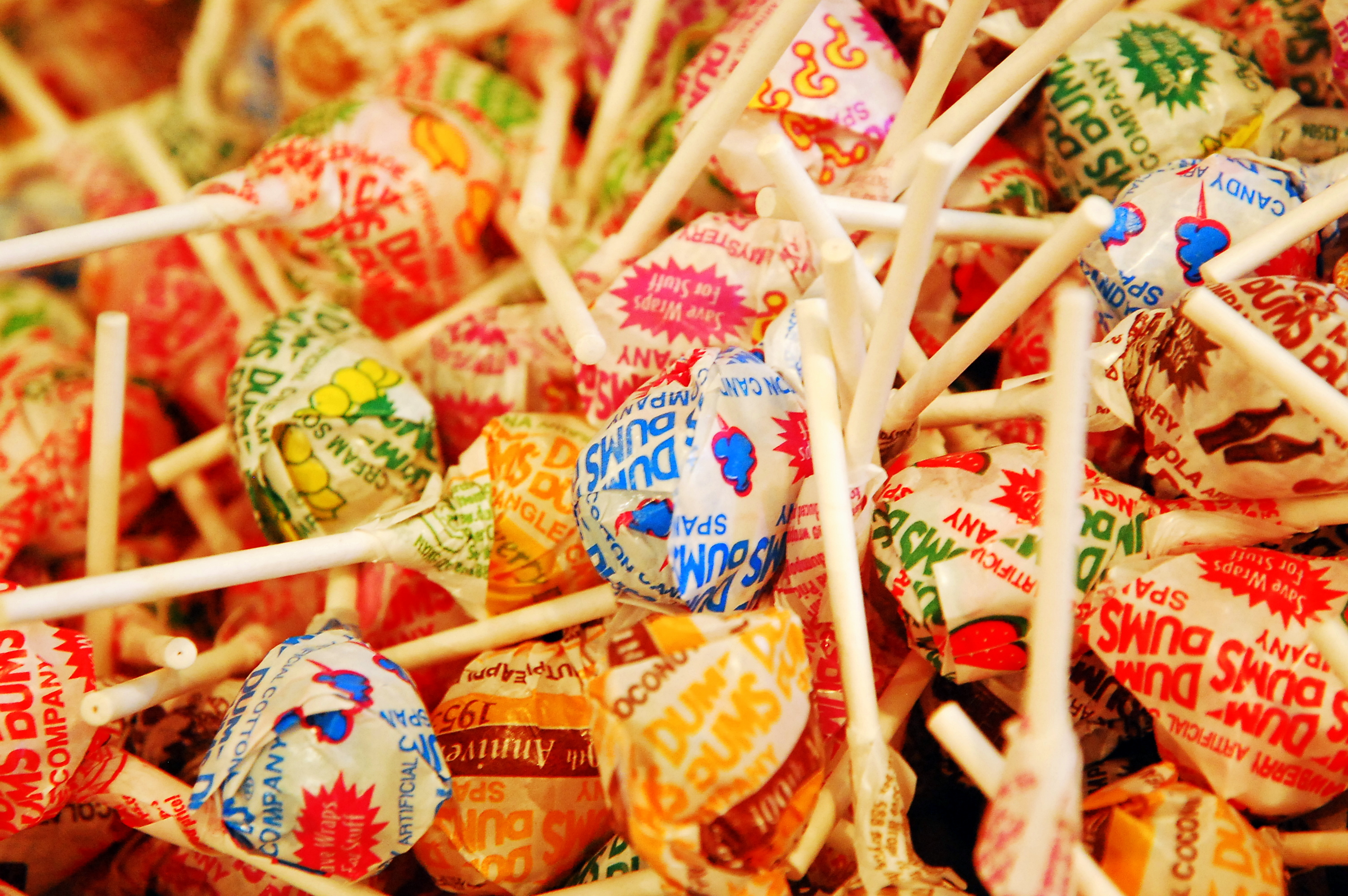 Dum Dums